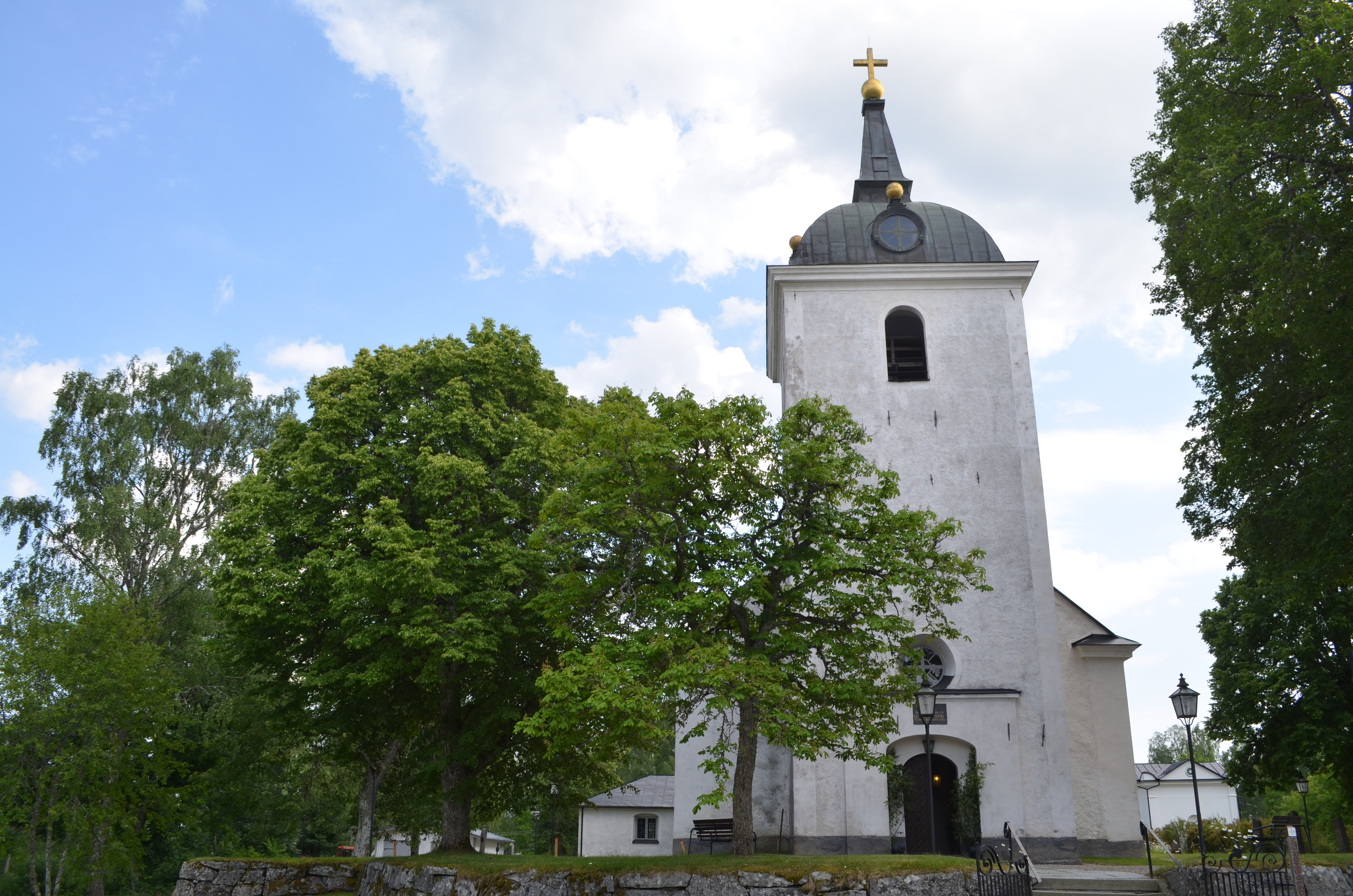 Heds kyrka 2015